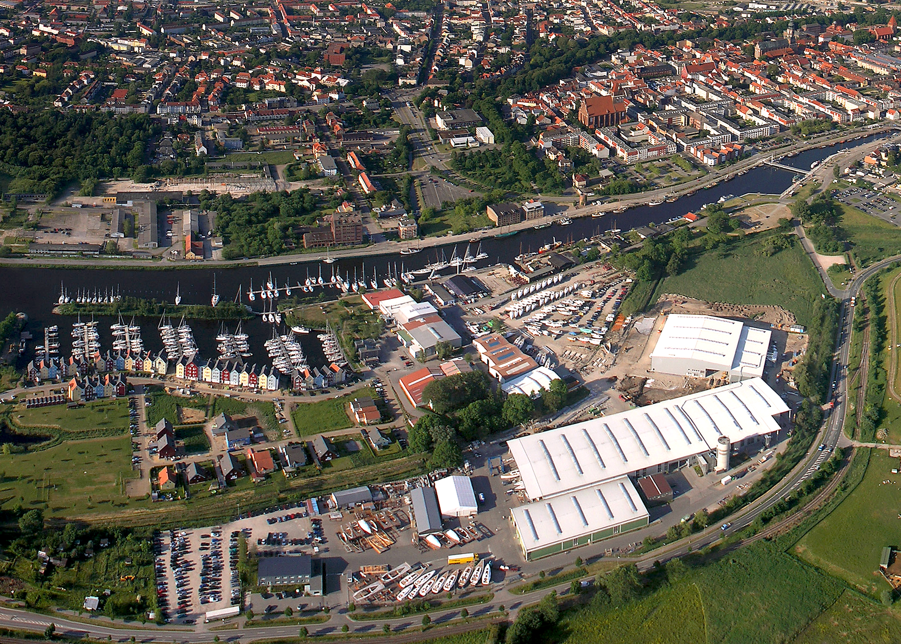 Produktionsstätte der HanseYachts AG in Greifswald